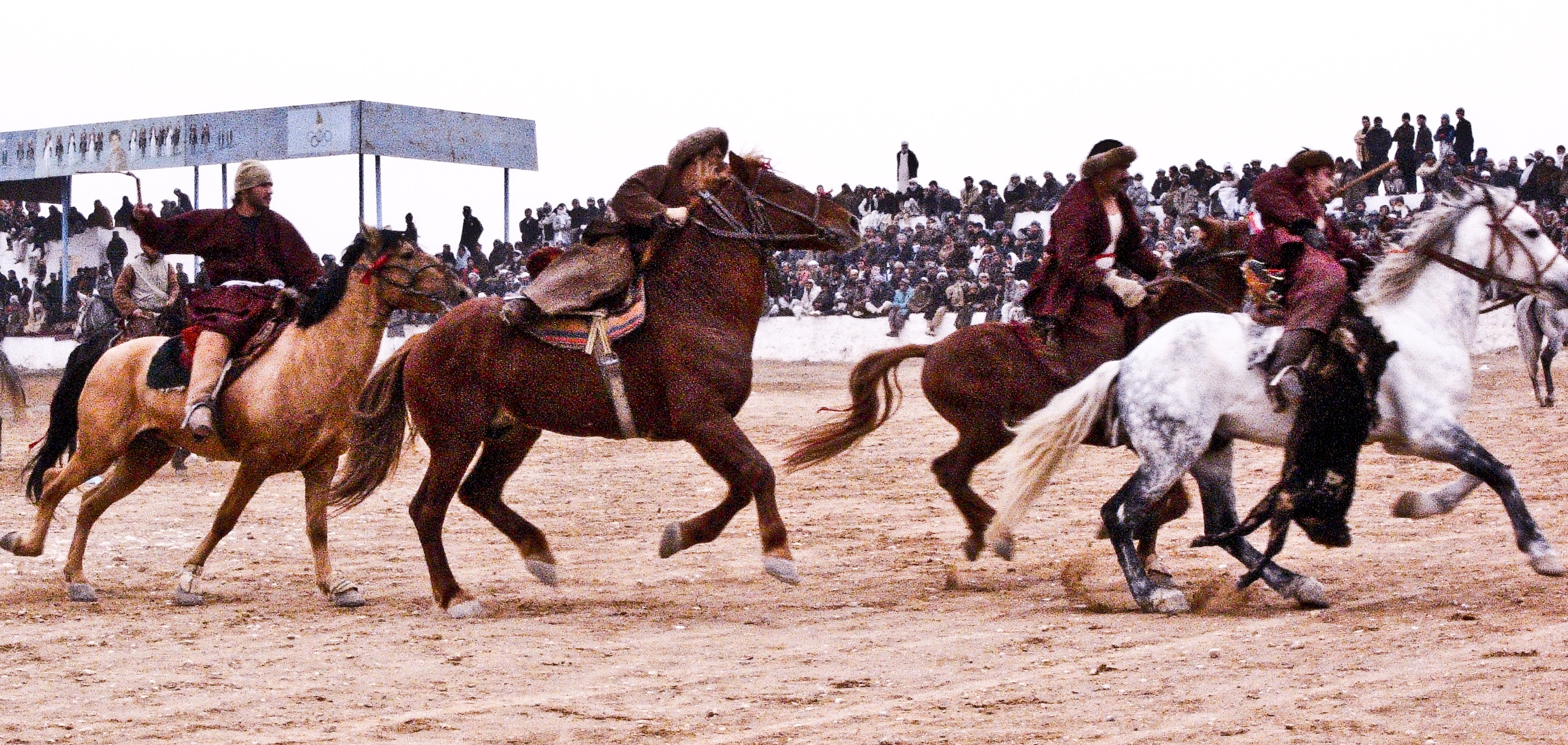 Buzkashi in Mazar-e Sharif, Afghanistan